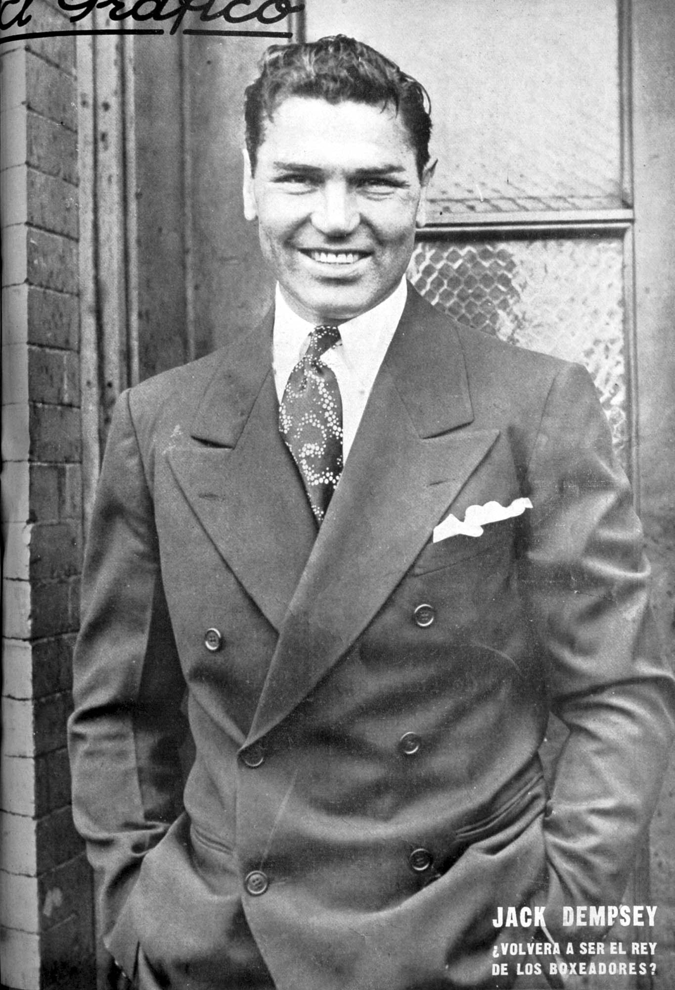 El Grafico del 30 de Julio de 1927. Edicion 421